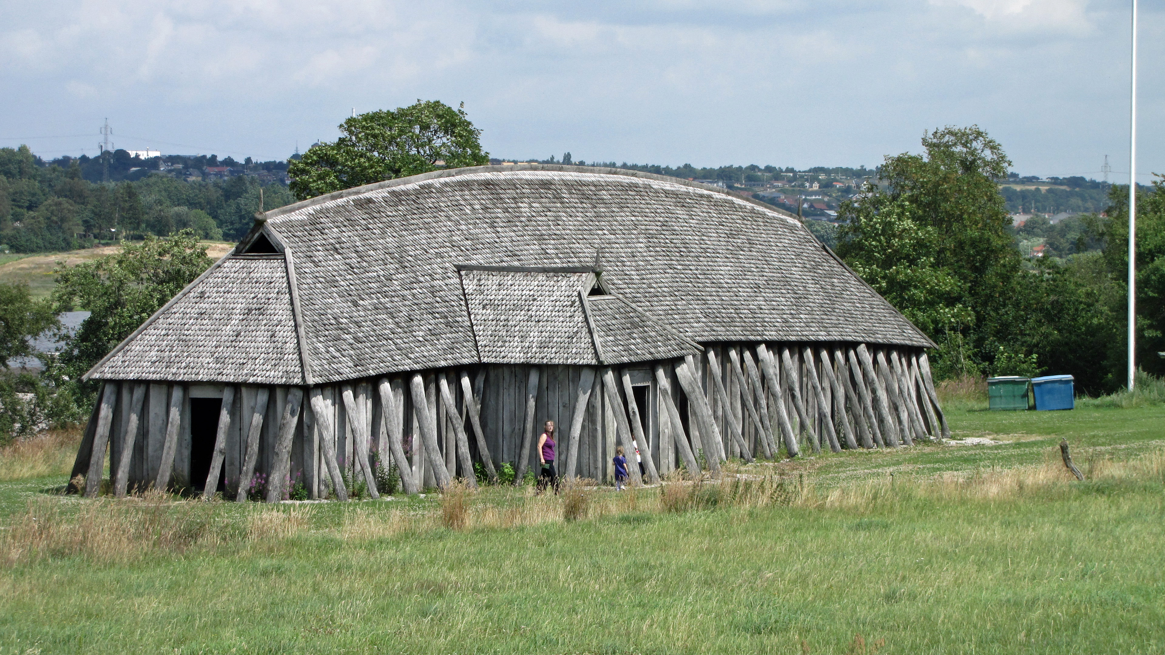 Fyrkat